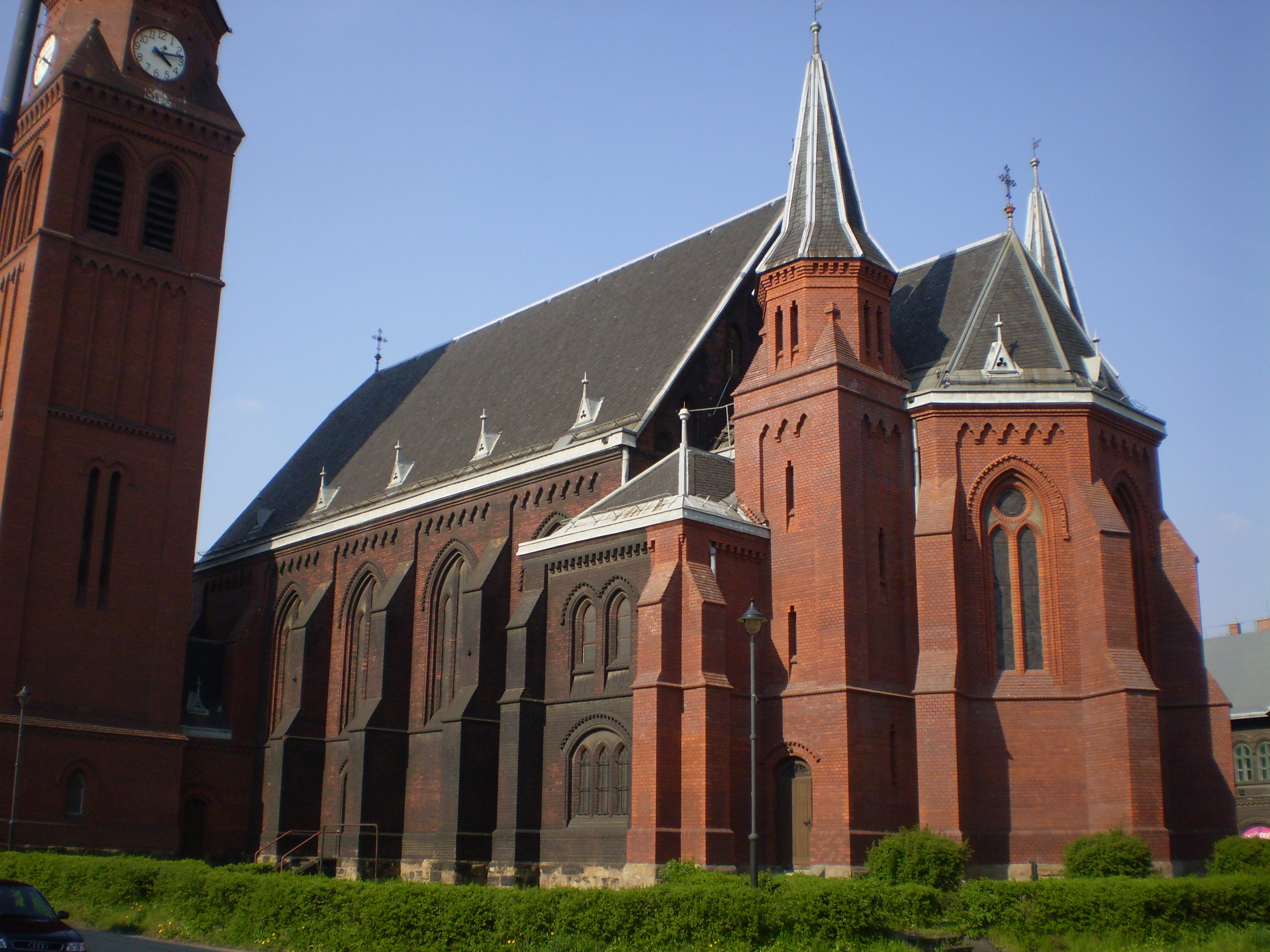 Novogotický kostel svatého Pavla v Ostravě-Vítkovicích.